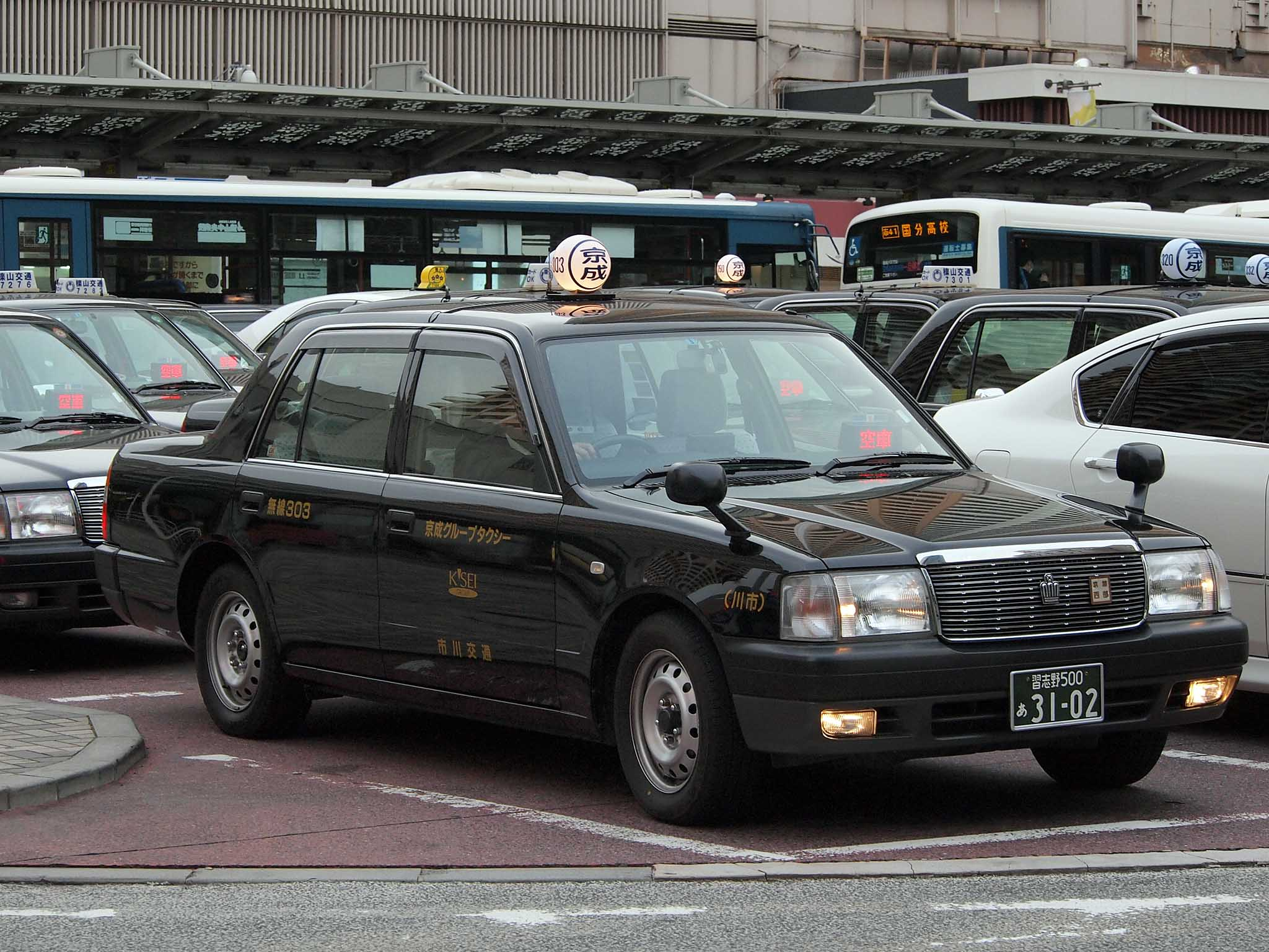 市川交通自動車のトヨタ・クラウンコンフォート。2014年に京成グループタクシーの一員となり、行灯が「市交」から「京成」に改められた。 登録番号：習志野500あ3102 撮影地：千葉県市川市、JR市川駅